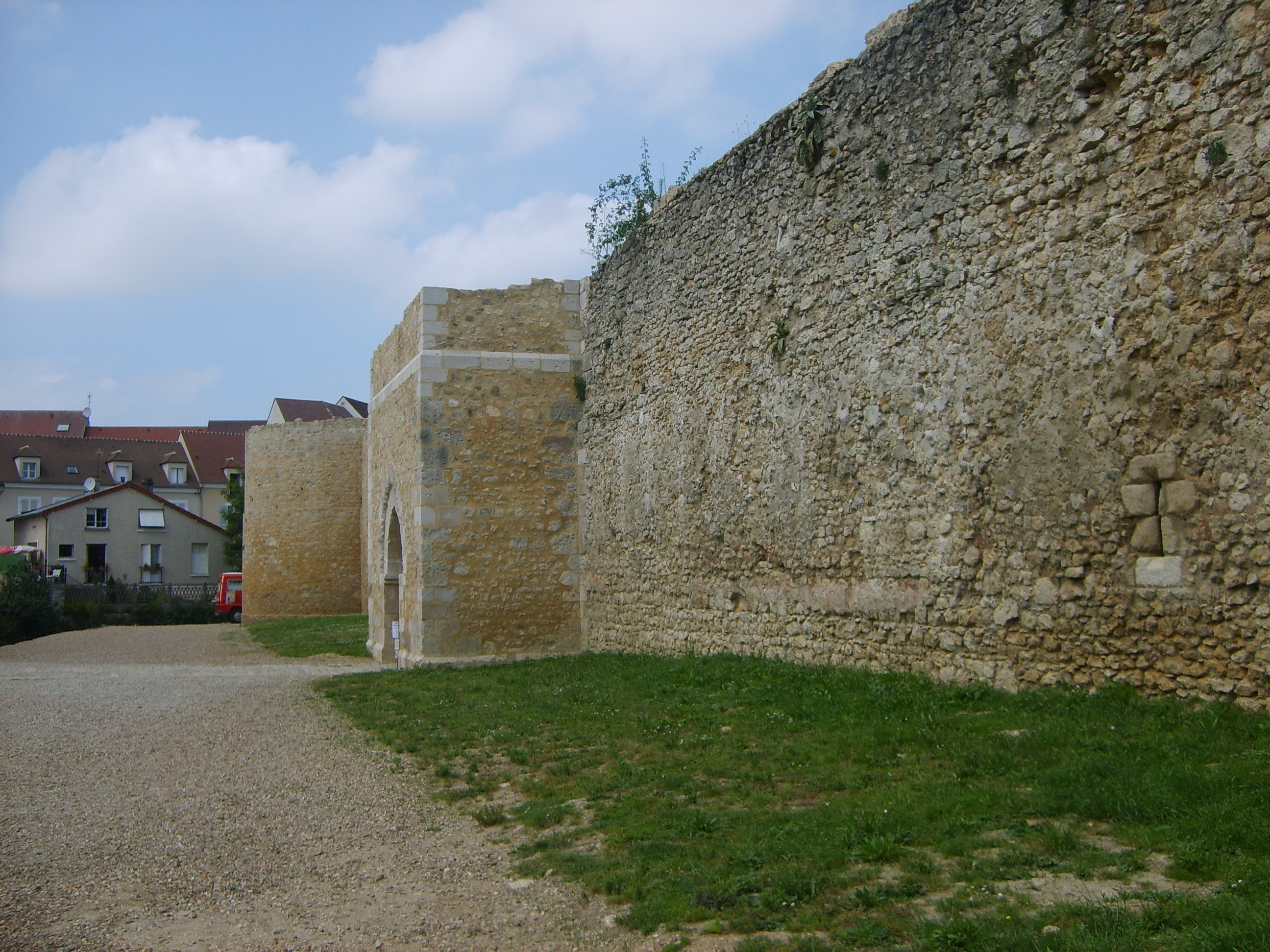 Porte de Brie du Château de Brie-Comte-Robert